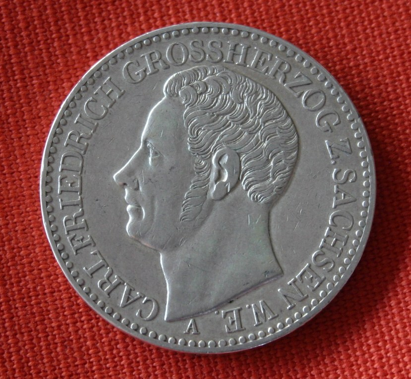 Silbermünze zu einem Taler Carl Friedrich Sachsen-Weimar-Eisenach 1841.JPG